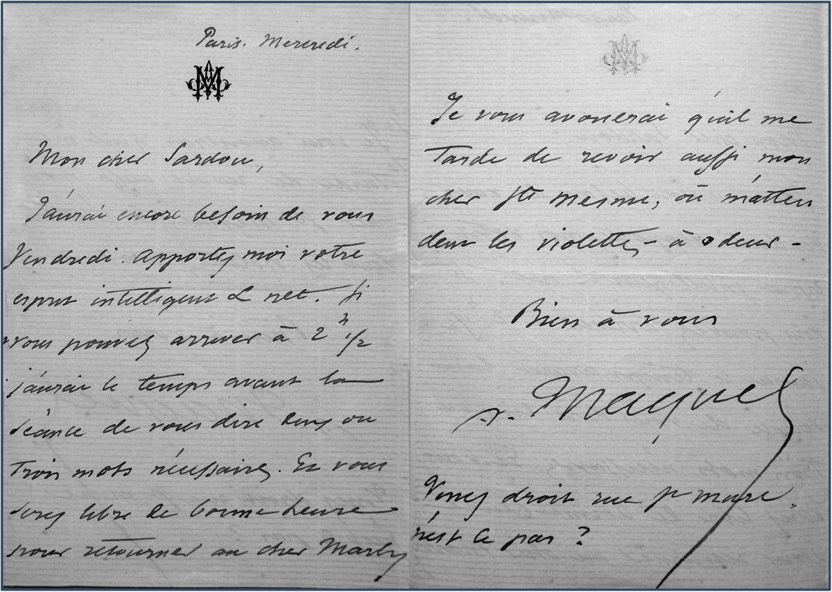 Письмо Огуста Маке Викторьену Сарду